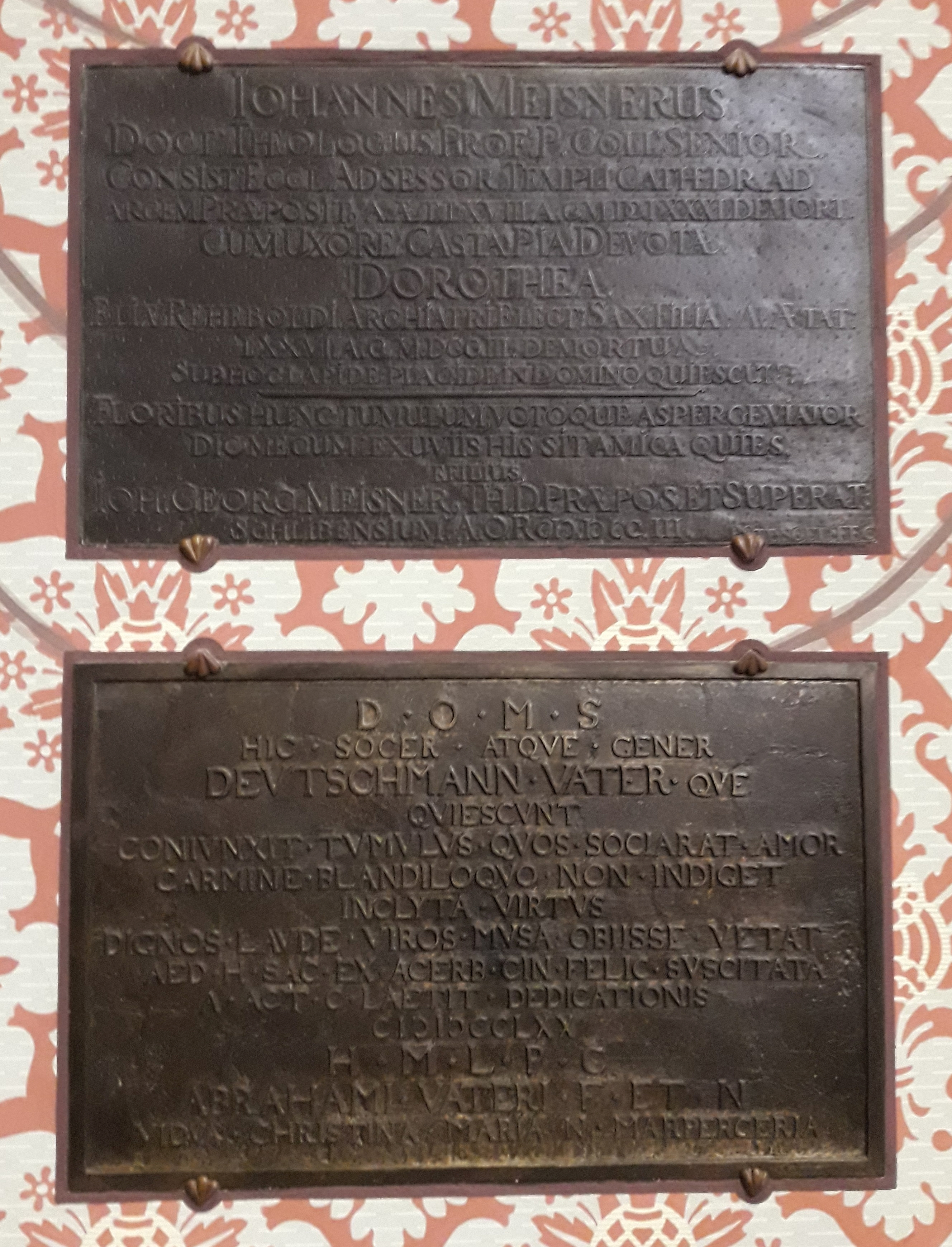 Denkmäler für Johannes Meisner (oben) und Abraham Vater (unten) in der Schlosskirche Wittenberg